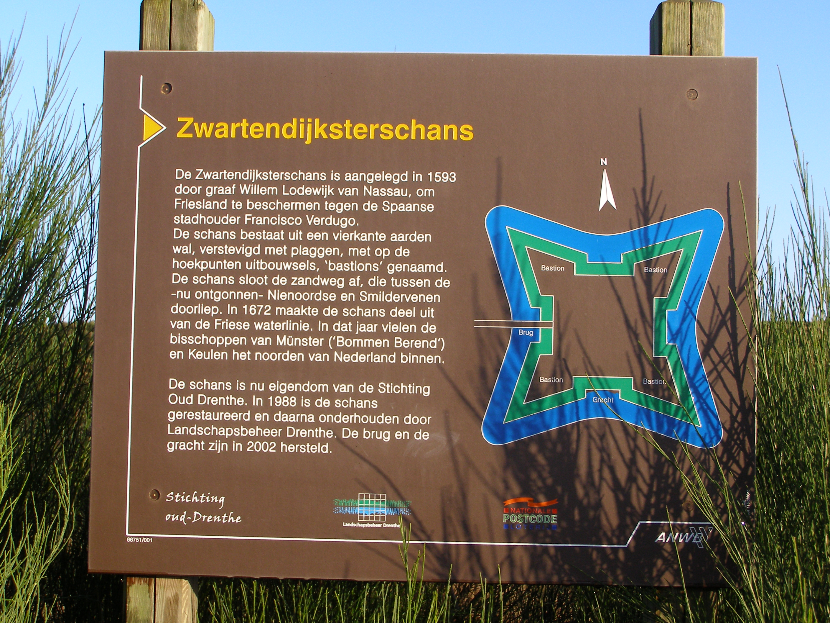 Zwartendijksterschans ANWB bord